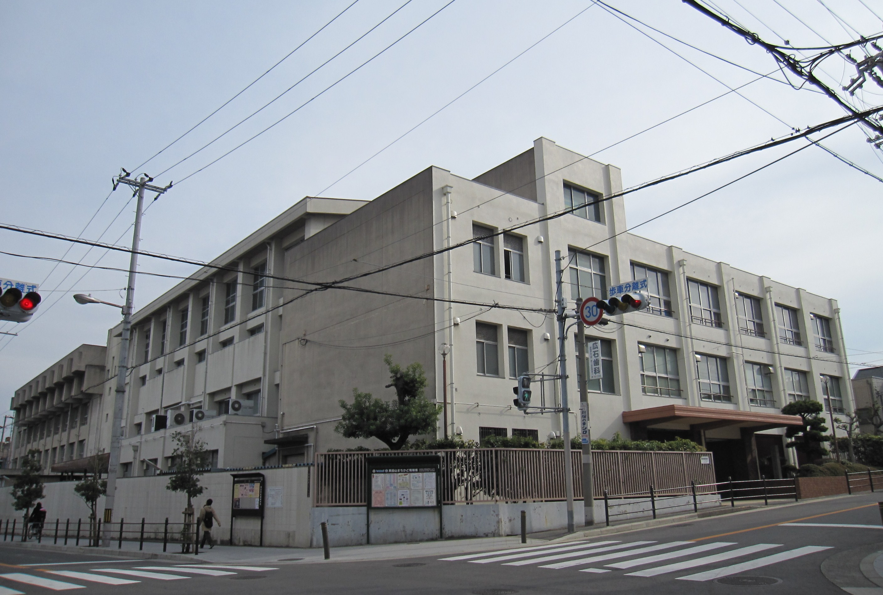 大阪市立高津中学校 Canon IXY Digital 920 IS